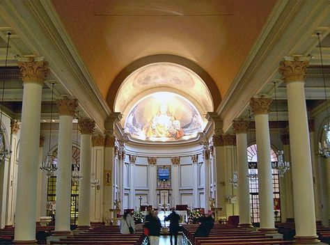 Inneres der Kathedrale von Punta Arenas